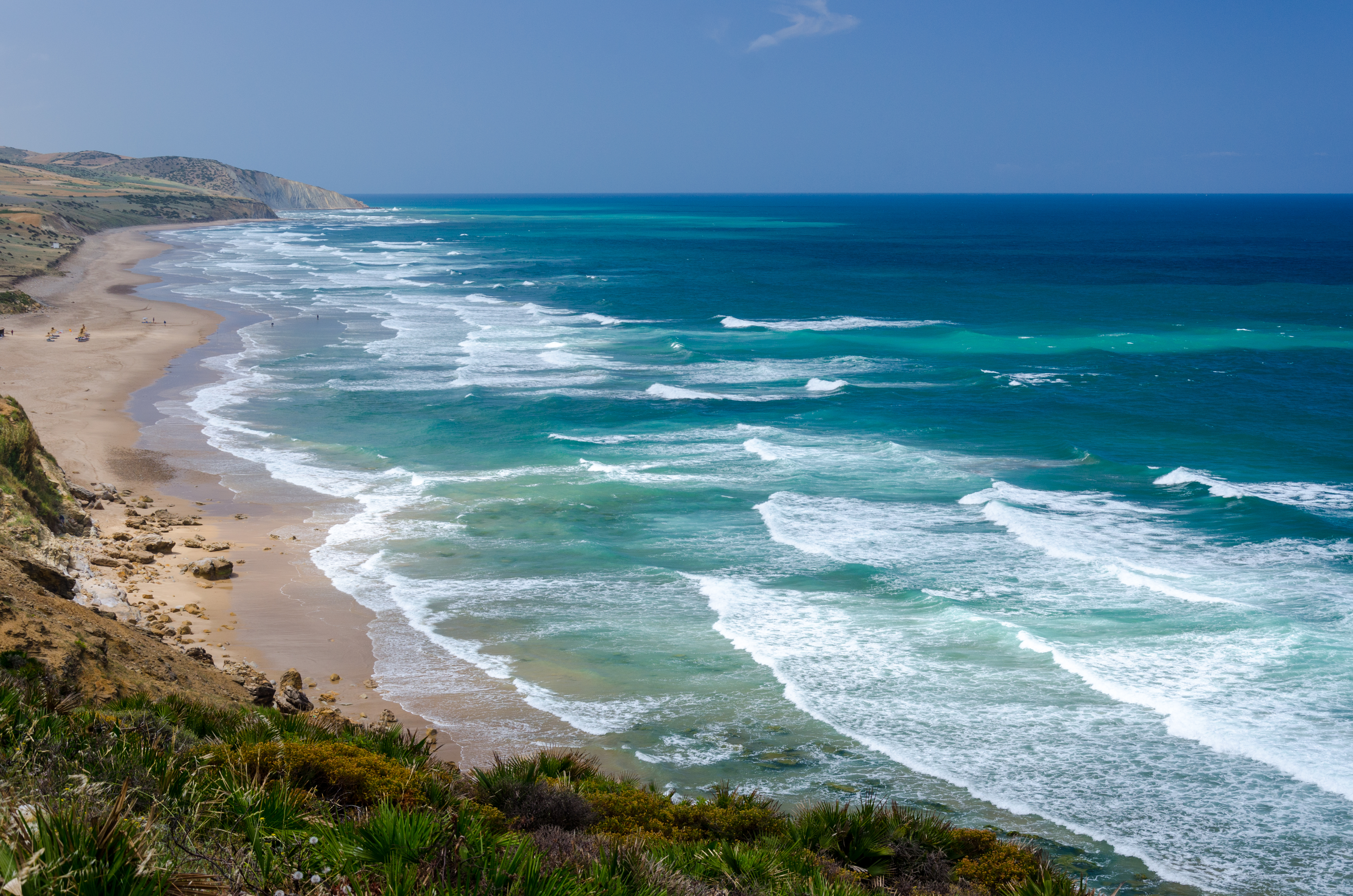 Plage de Paradis. Paradise Beach. Assilah (Maroc).